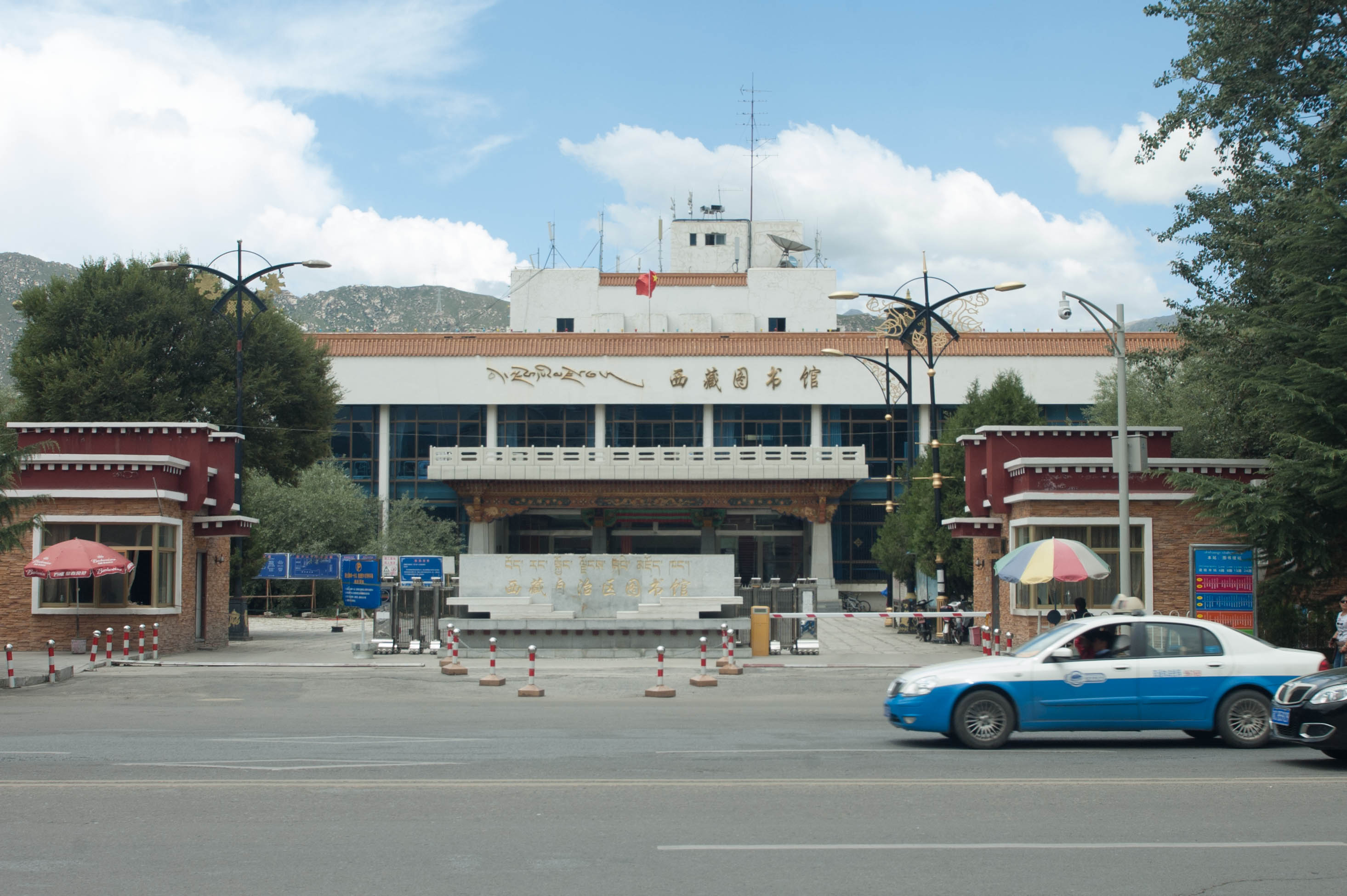 2013西藏图书馆外貌